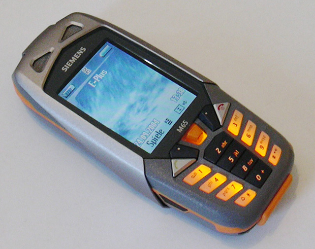 Foto des Mobiltelefons Siemens M65